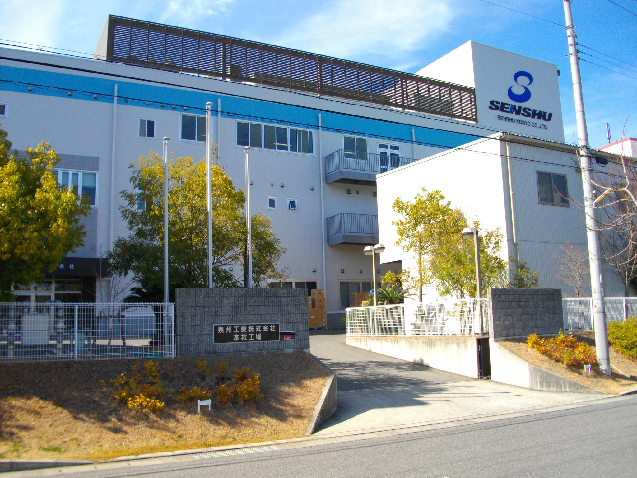 投稿者自身が『泉州工業株式会社 本社工場』 （大阪府和泉市テクノステージ3丁目4番8号）を撮影。